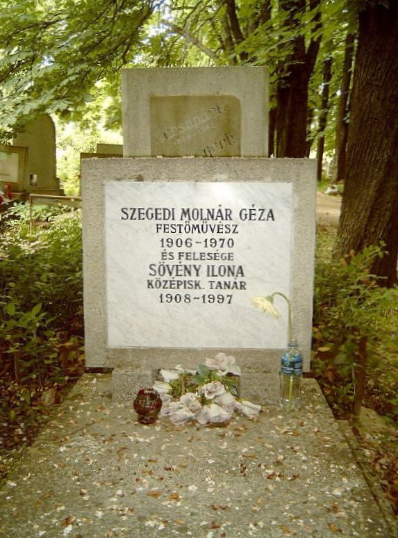 Szegedi Molnár Géza, Molnár (Szeged, 1906. febr. 21. – Szombathely, 1970. nov. 10.): festő, Szegedi Molnár Géza színművész apjának sírja Budapesten. Új köztemető: 90/11-1-35